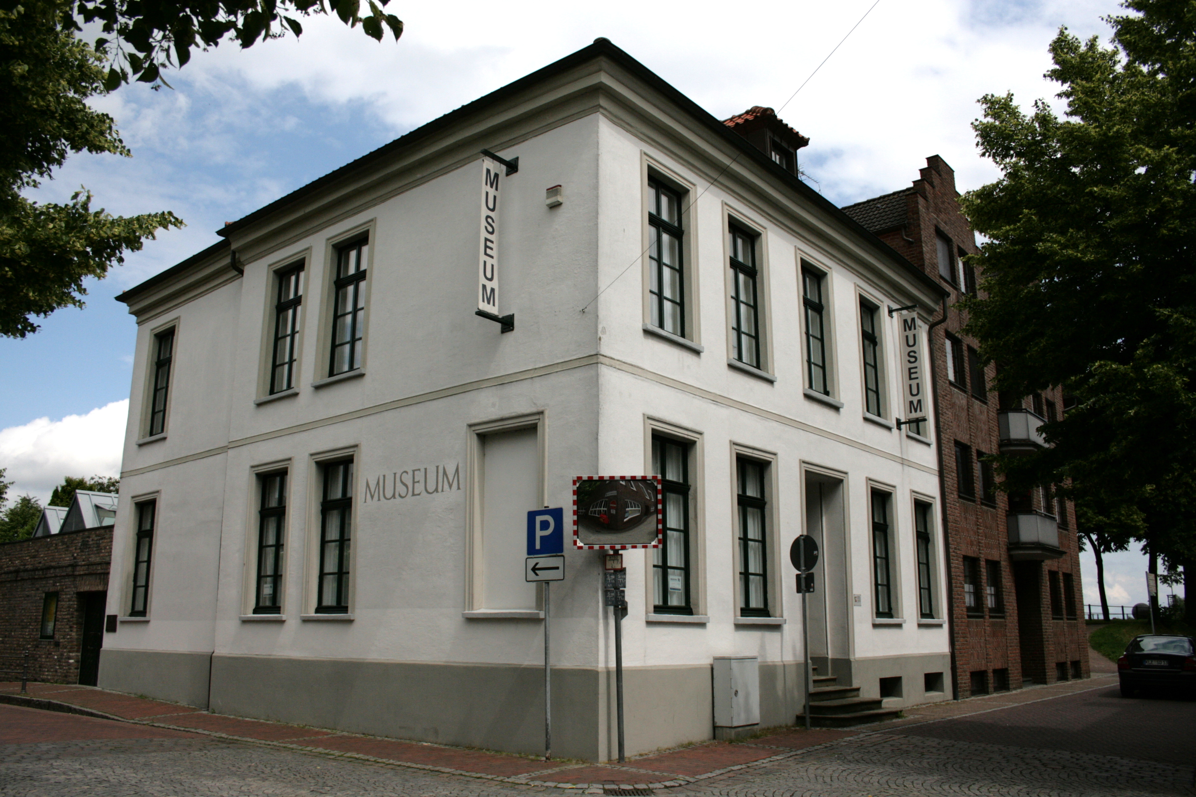 Städtisches Museum Koenraad Bosman im Gebäude Keim, Am Bär 1 in Rees